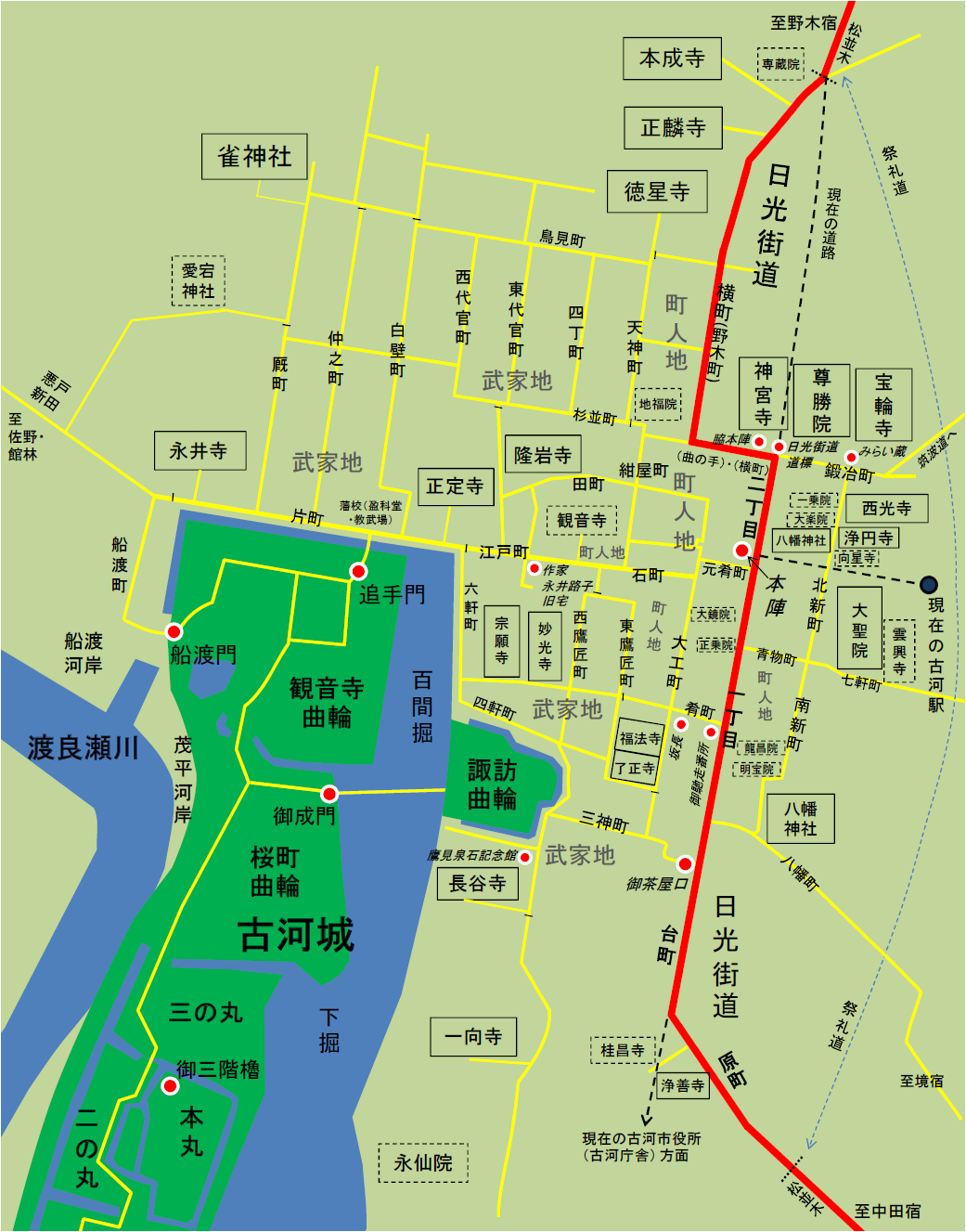 茨城県古河市にあった古河城下町・日光街道古河宿の図